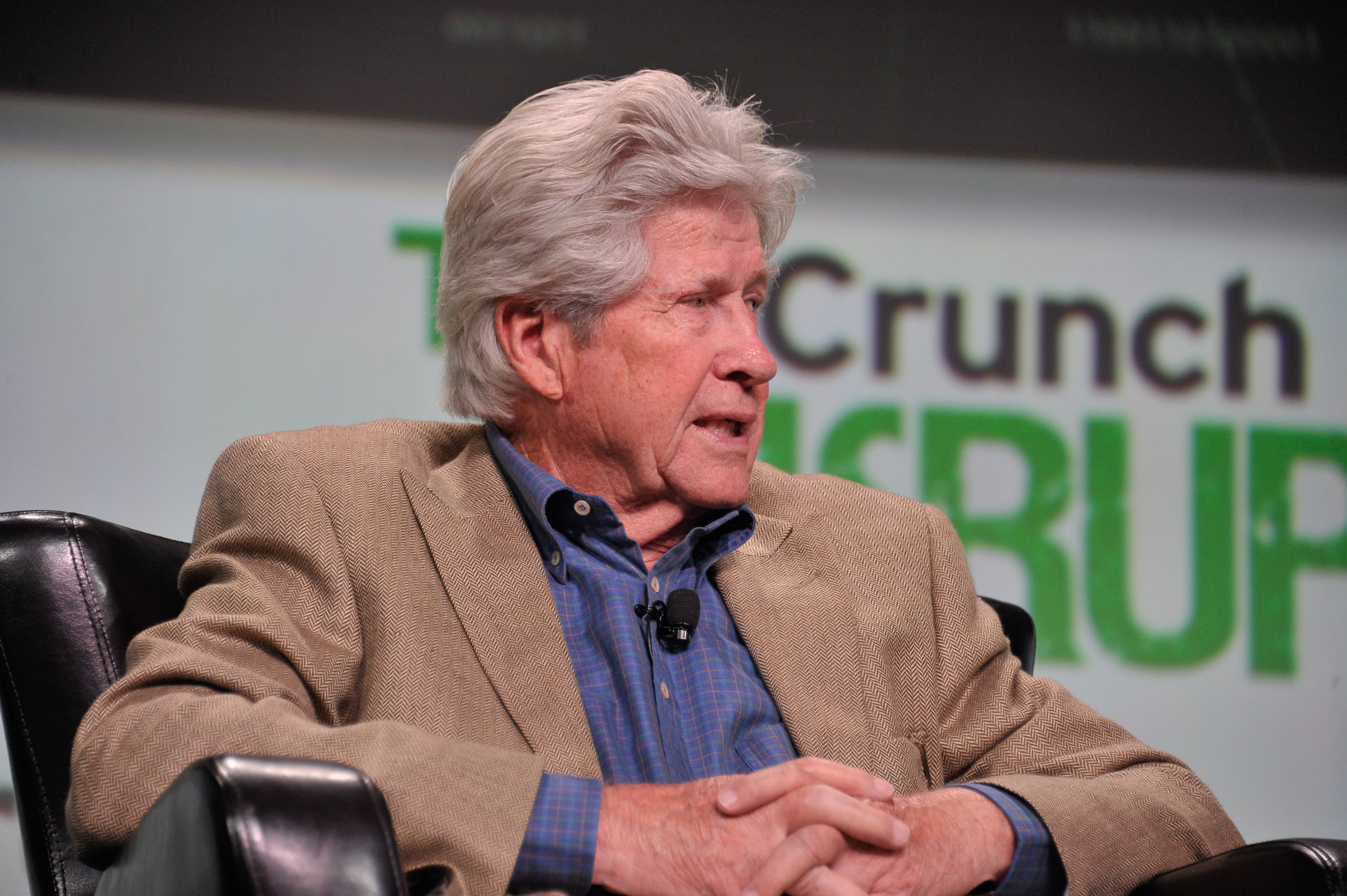 _SJP3105